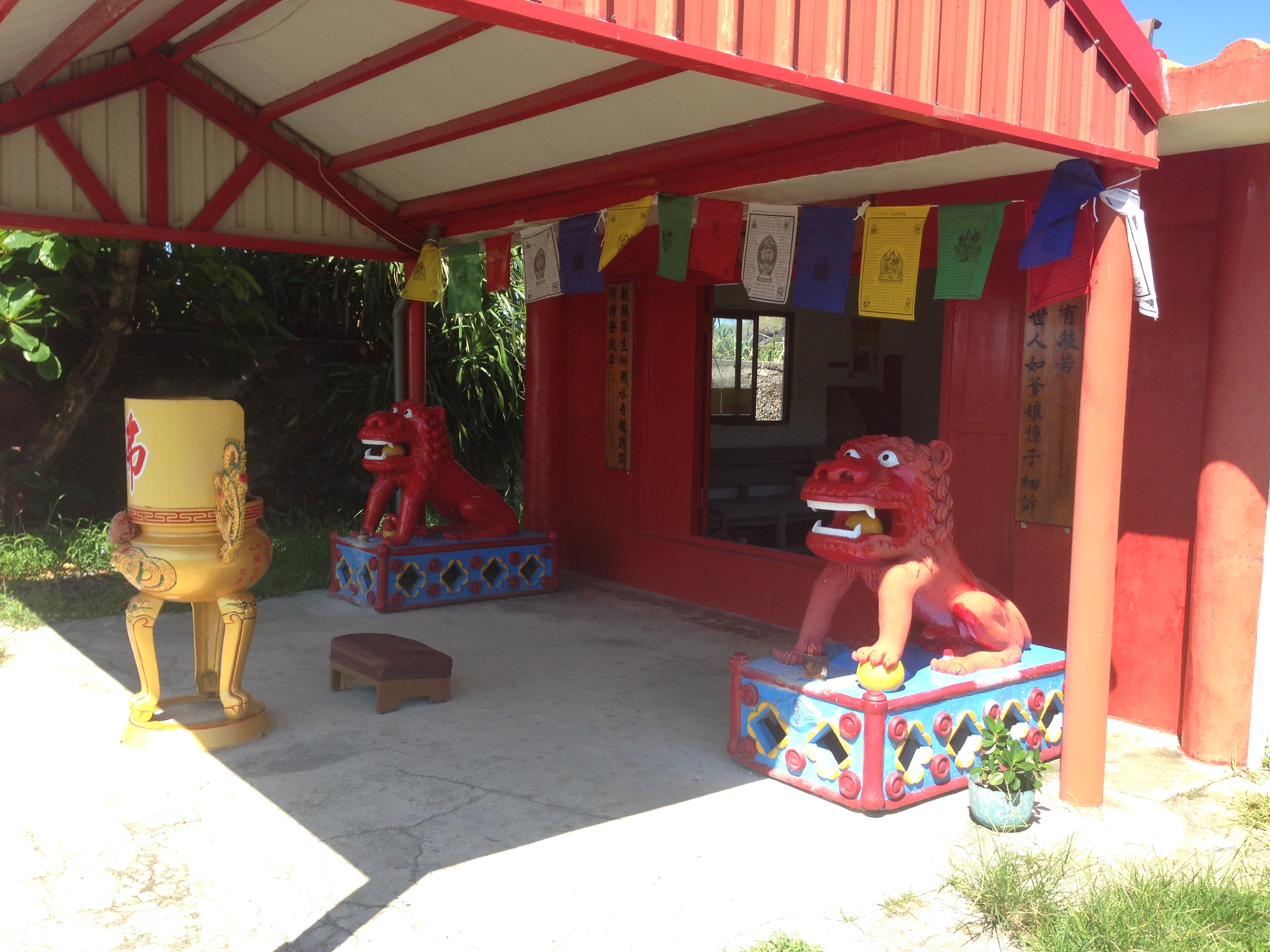 綠島慈航宮側照